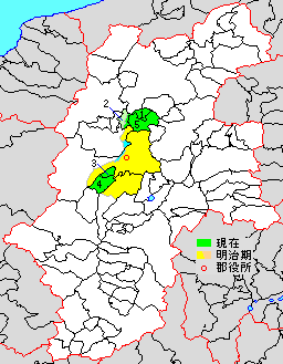 長野県東筑摩郡の位置